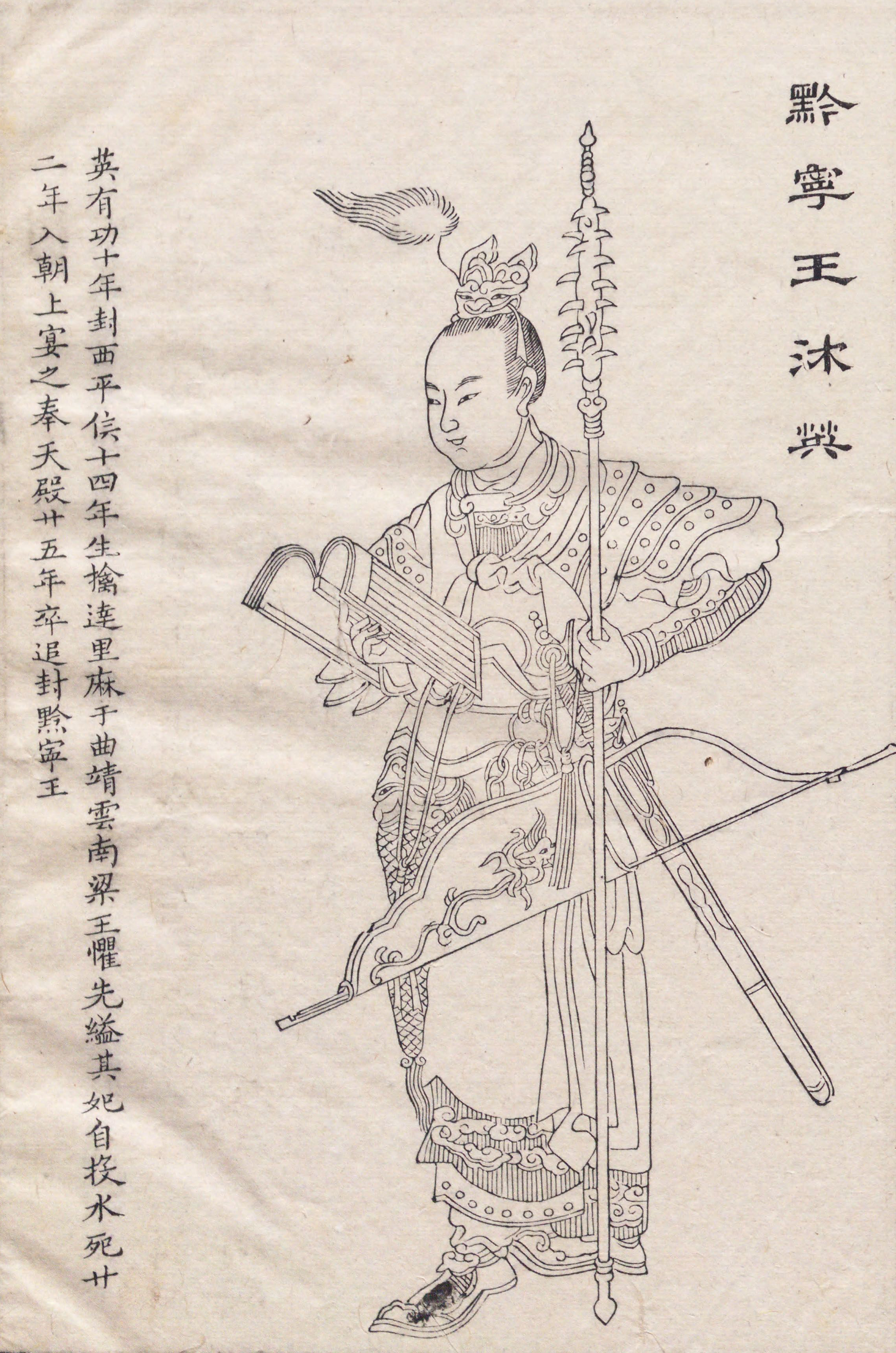 沐英，明朝军事將領。